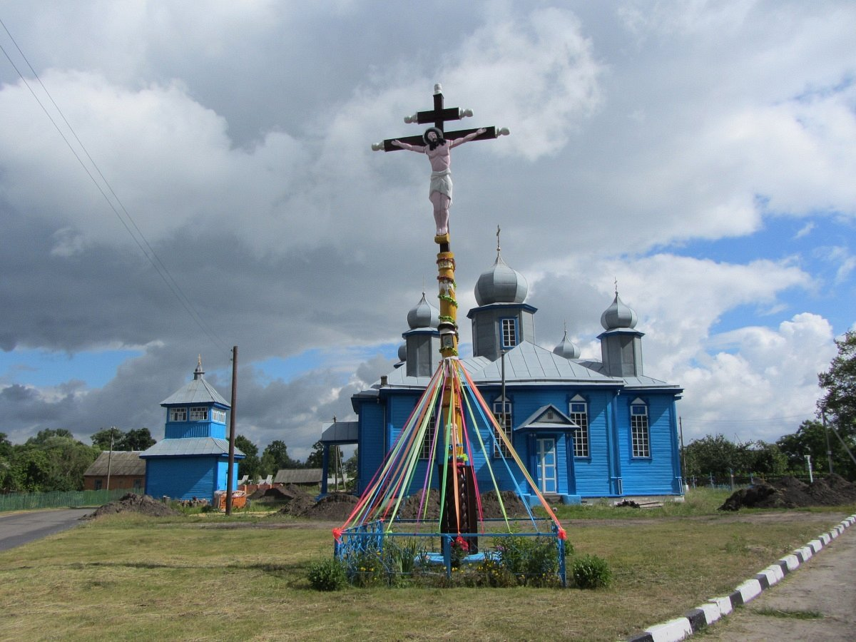 Плотніца. Пакроўская царква